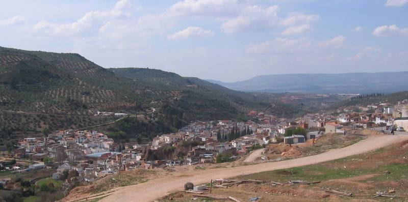 Vista de Beas entrando desde Cañada Catena